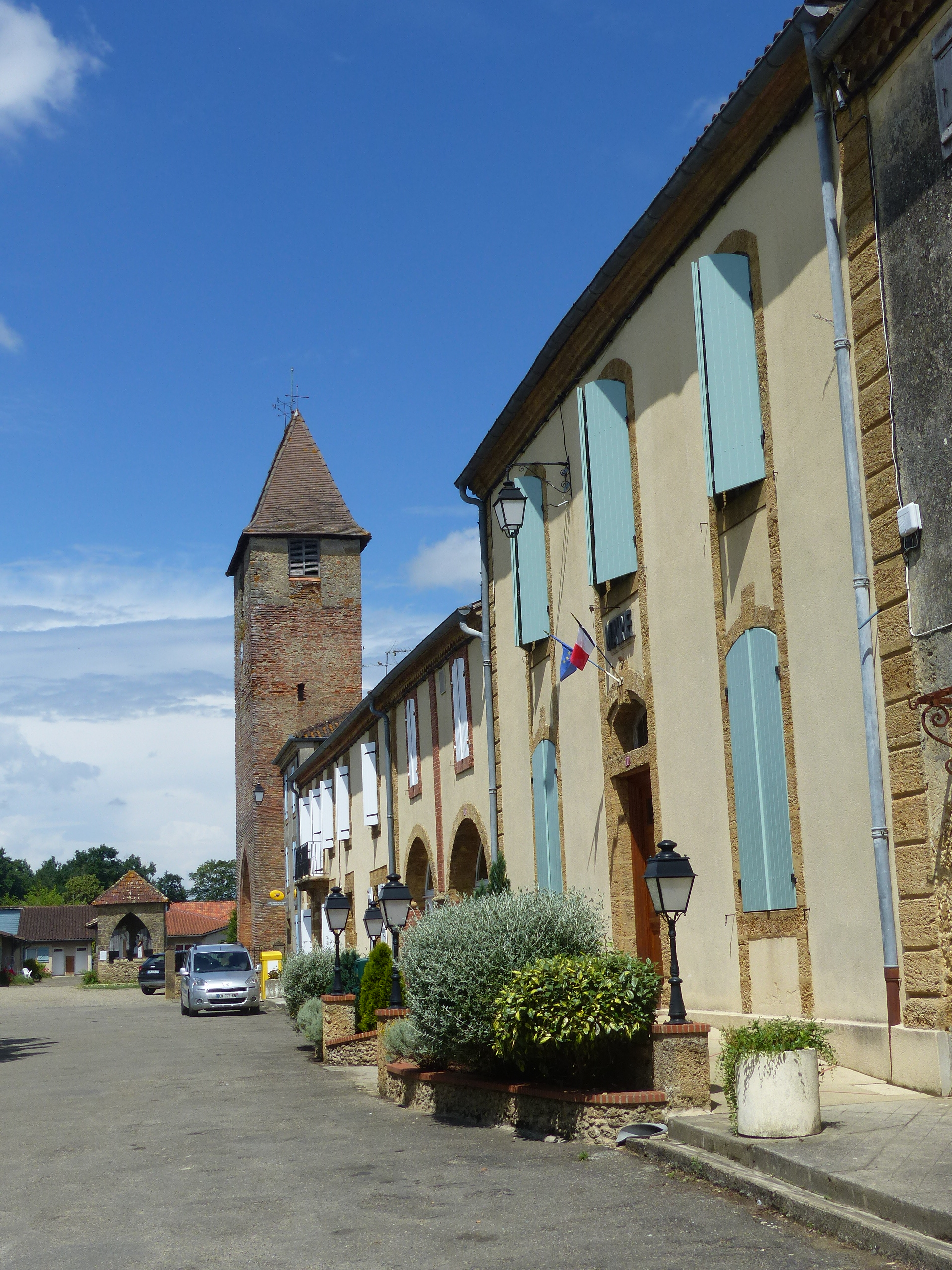 Monguilhem (Gers, France) : la mairie et le clocher